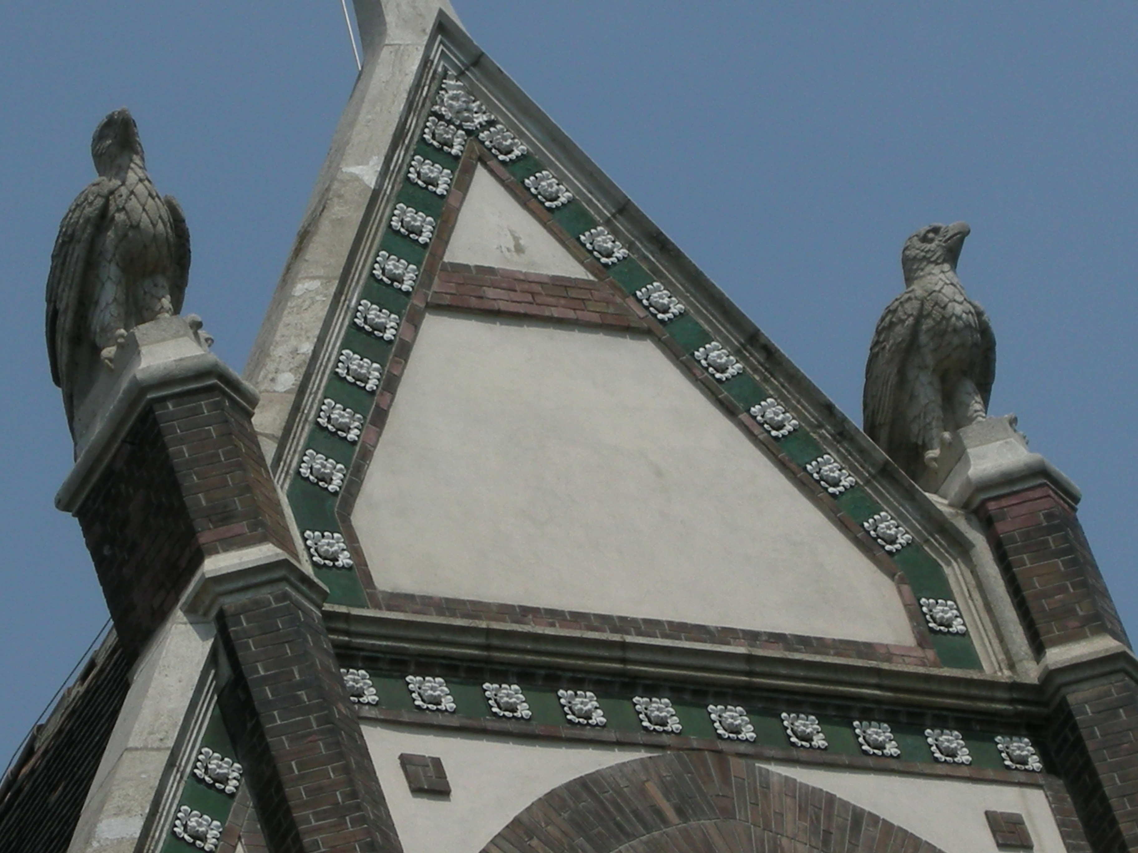 Budapest, IX. kerület, Haller utca 88.